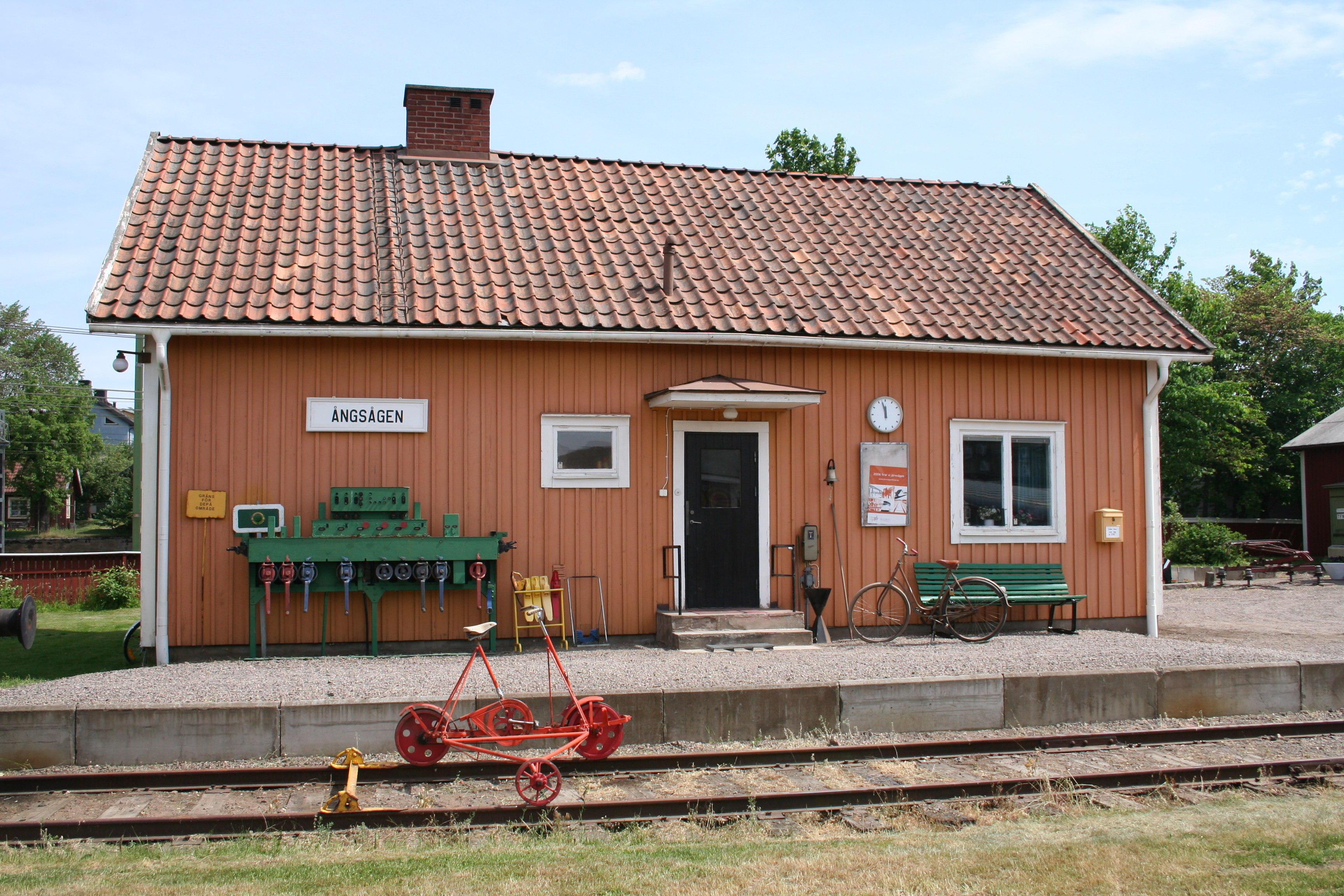 Nässjö Järnvägsmuseums huvudbyggnad på museiområdet i Nässjö som går under namnet "Ångsågen".